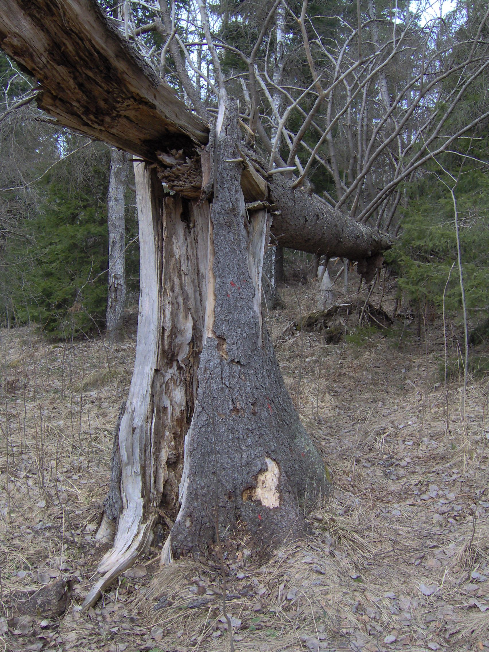 Nedblåst gran vid Visättra sportcenter, april 2006.